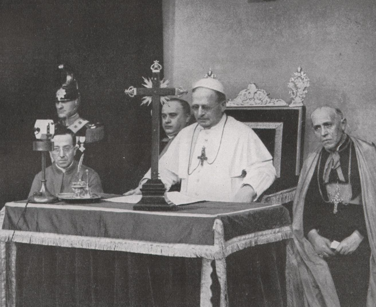 Pius XI. eröffnet Radio Vatikan, 12.2.1931